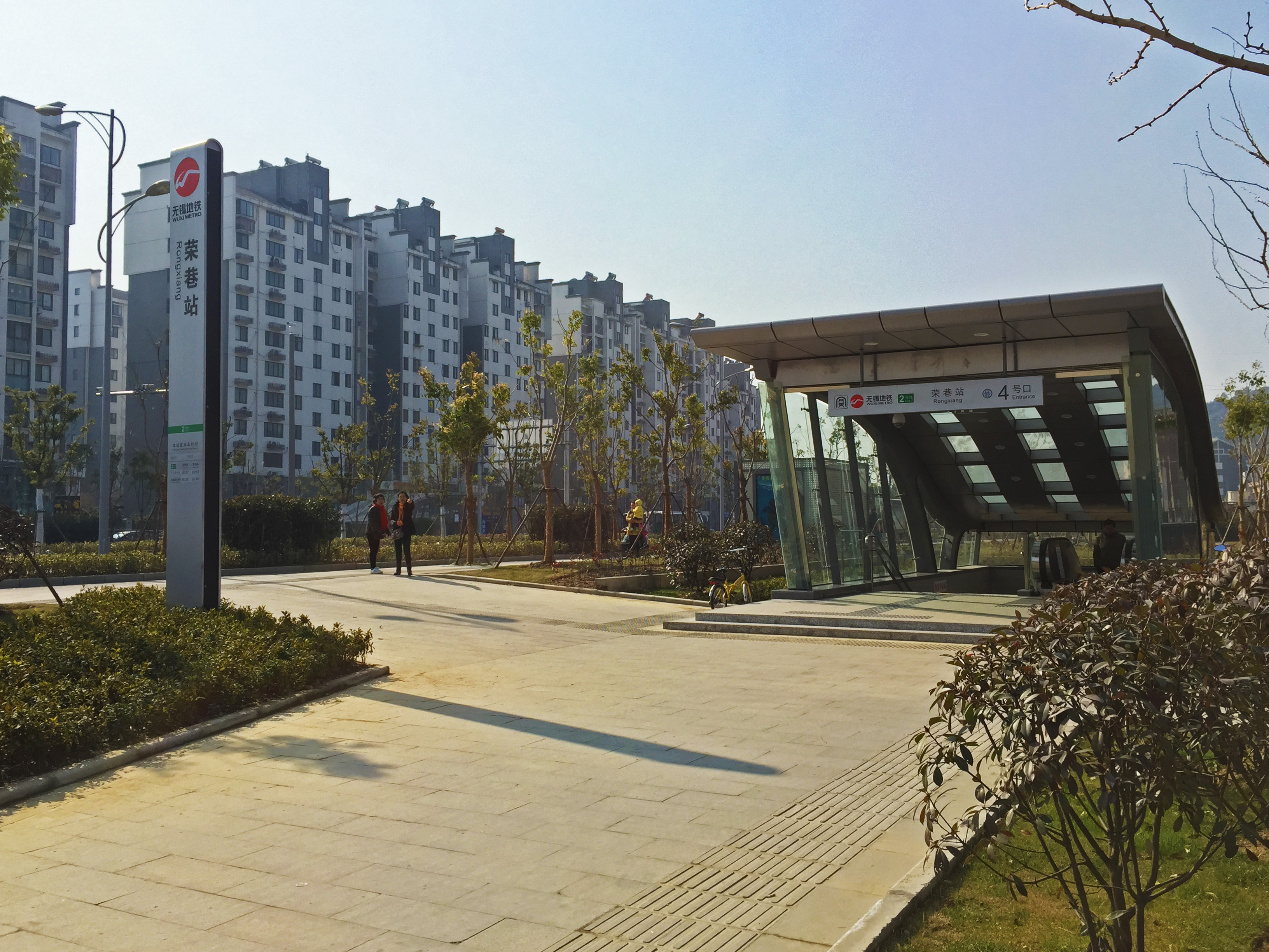 無錫地鐵2號線榮巷站4號出入口